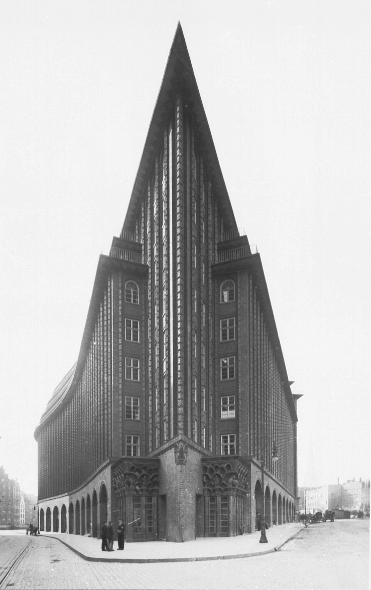 Chilehaus- Fotografie von Carl Dransfeld 1924 This is a photograph of an architectural monument.